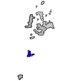 台灣省澎湖縣望安鄉KaurJmeb於2005年2月8日為編輯澎湖縣zh:望安鄉所繪